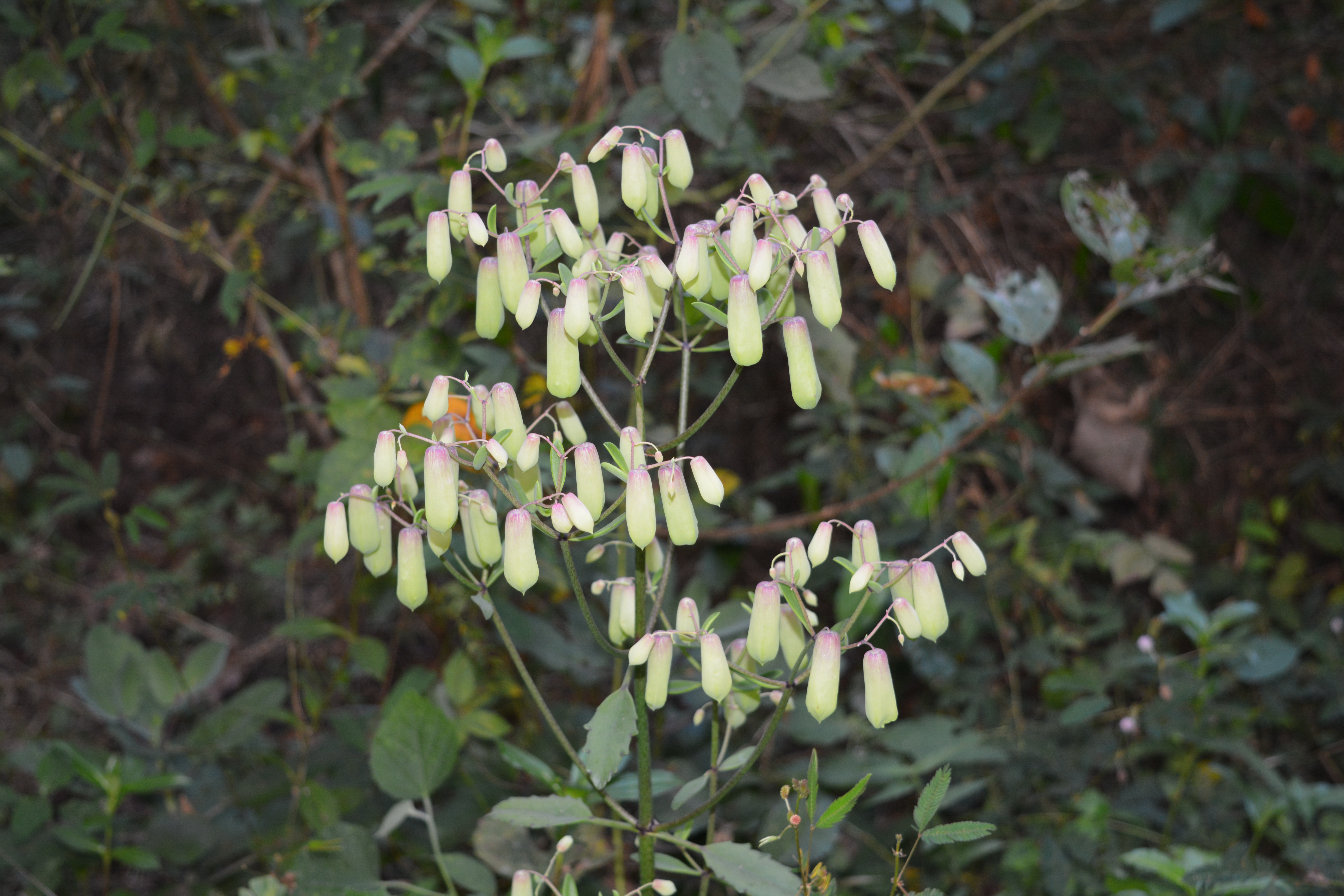 Photos taken from Kannavam Reserve Forest and Peravoor